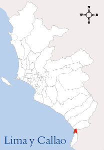 Localización del distrito de Santa María del Mar Esta imagen ha sido elaborada por--Edgardo Reyes 21:15 11 abr, 2005 (CEST)